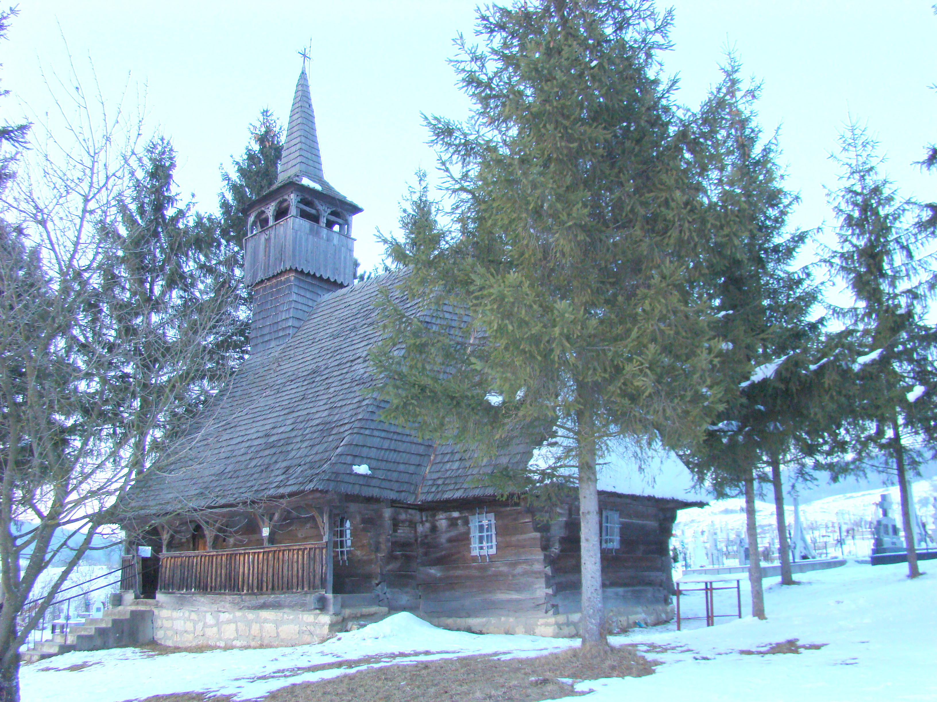 Biserica de lemn „Nașterea Maicii Domnului” din Aghireșu-Fabrici, județul Cluj